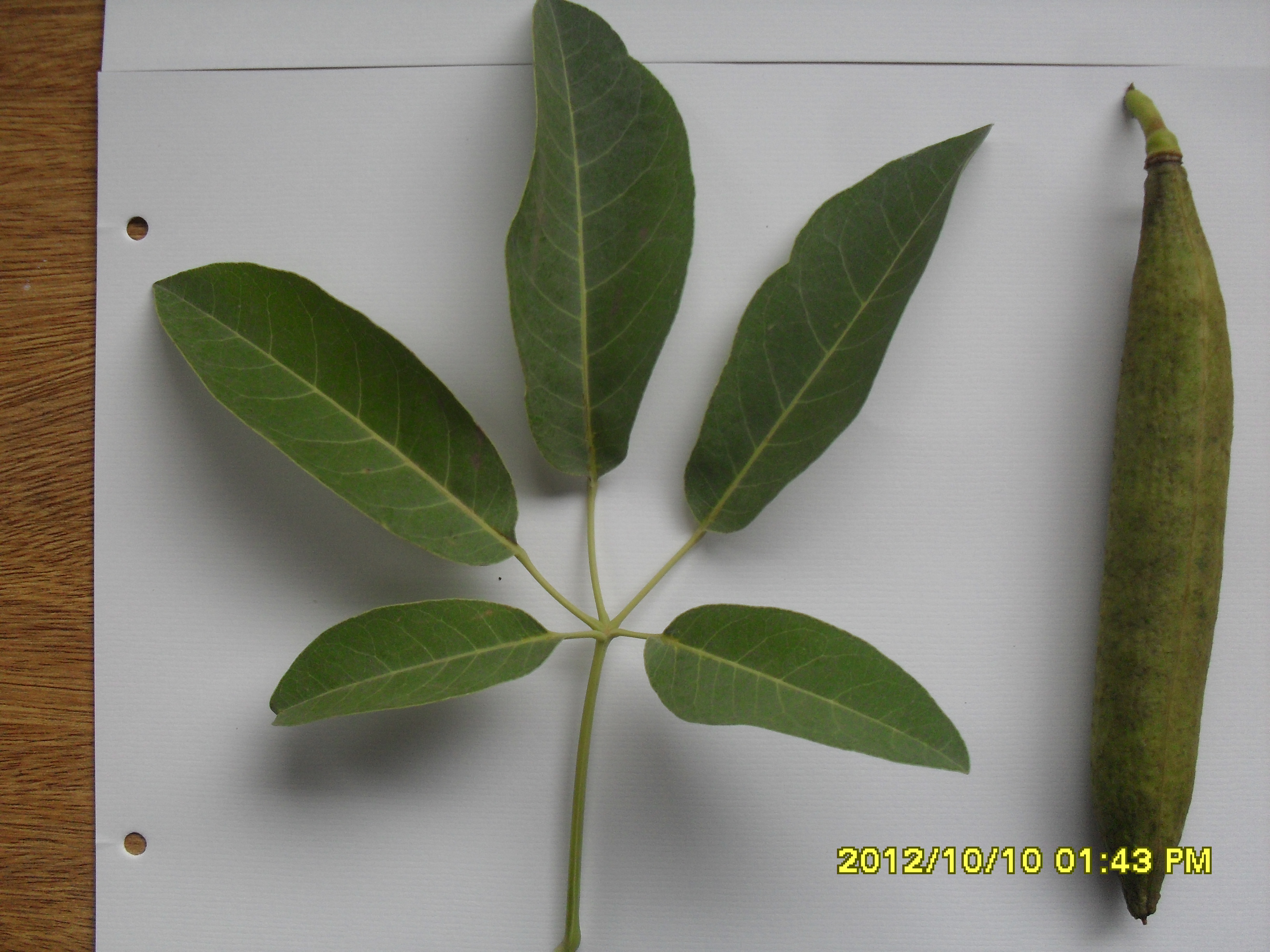 hoja pentafoliada de Tabebuia aurea con la cápsula(FRUTO)